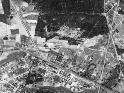 Tereny Antoninka, w tym dzisiejszych zakładów Volkswagena i wiaduktu Antoninek w przebiegu DK92). Zdjęcie z amerykańskiego satelity wywiadowczego KH-4A 1023, z 23 sierpnia 1965 r.